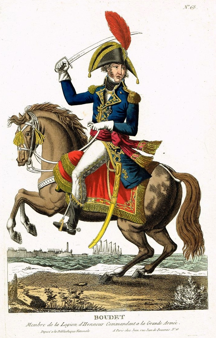 Jean Boudet (1769-1809), général de division et comte de l'Empire.